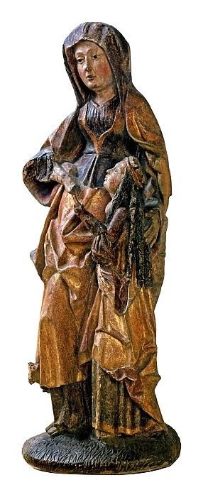 Sv. Anna Samotřetí (první čtvrtina 16. stol.), Cheb